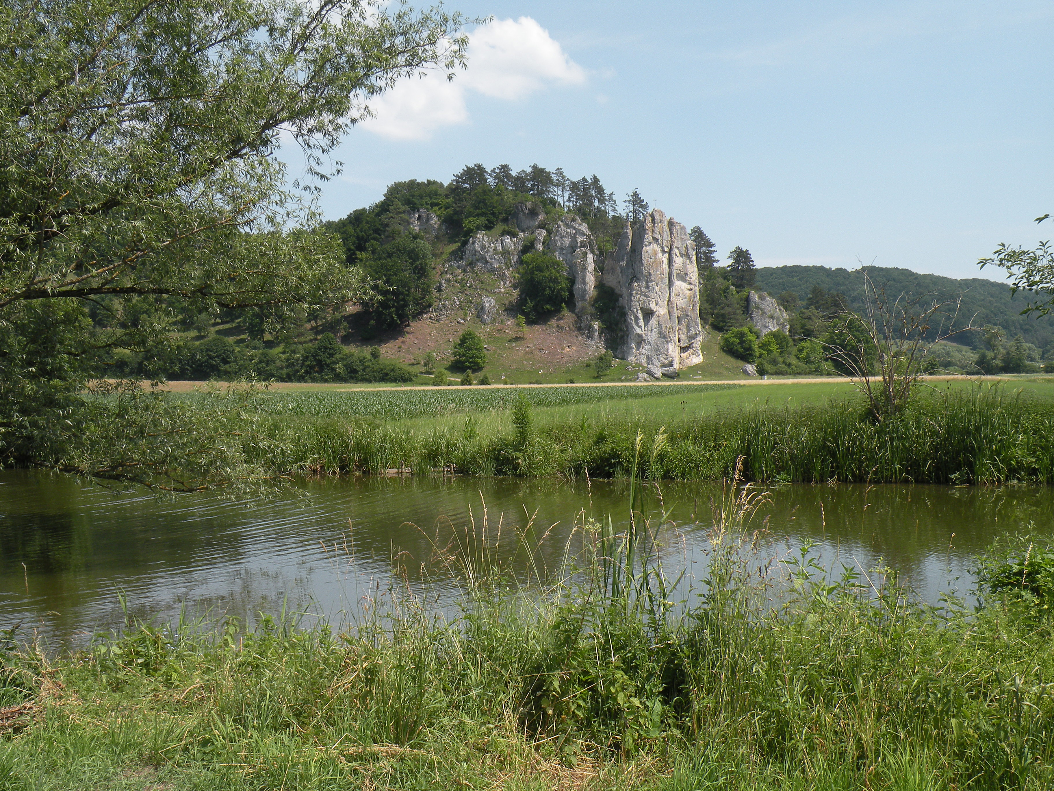 Altmuehl by Dollnstein